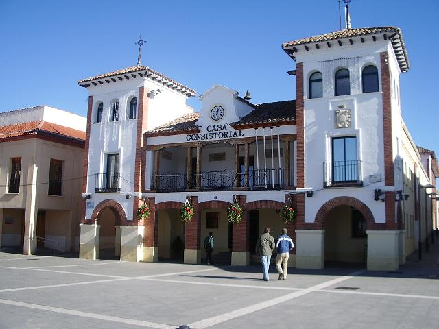 Ayuntamiento de Pinto (Madrid)